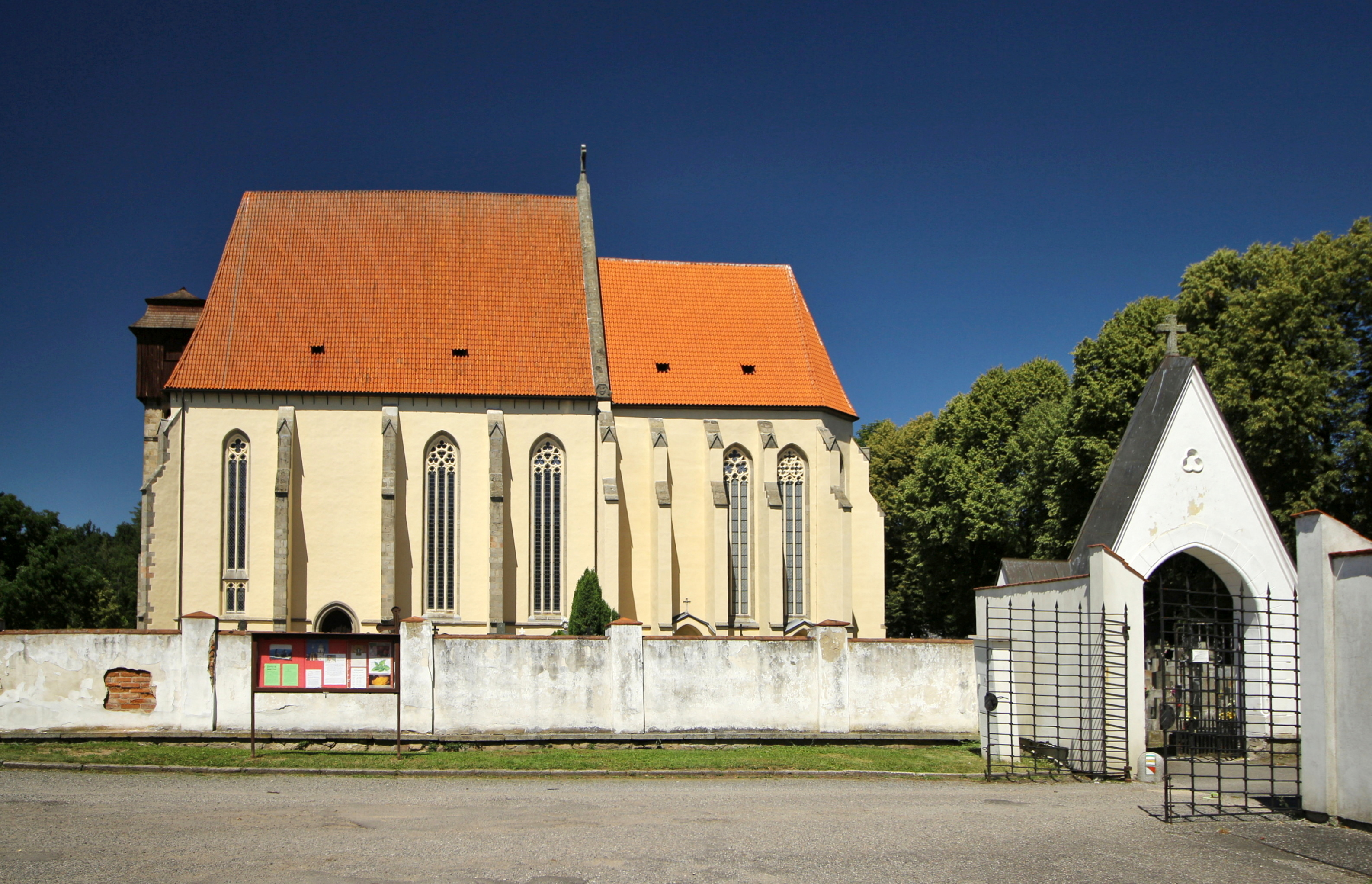 Hřbitovní kostel sv. Jiljí při klášteře v Milevsku